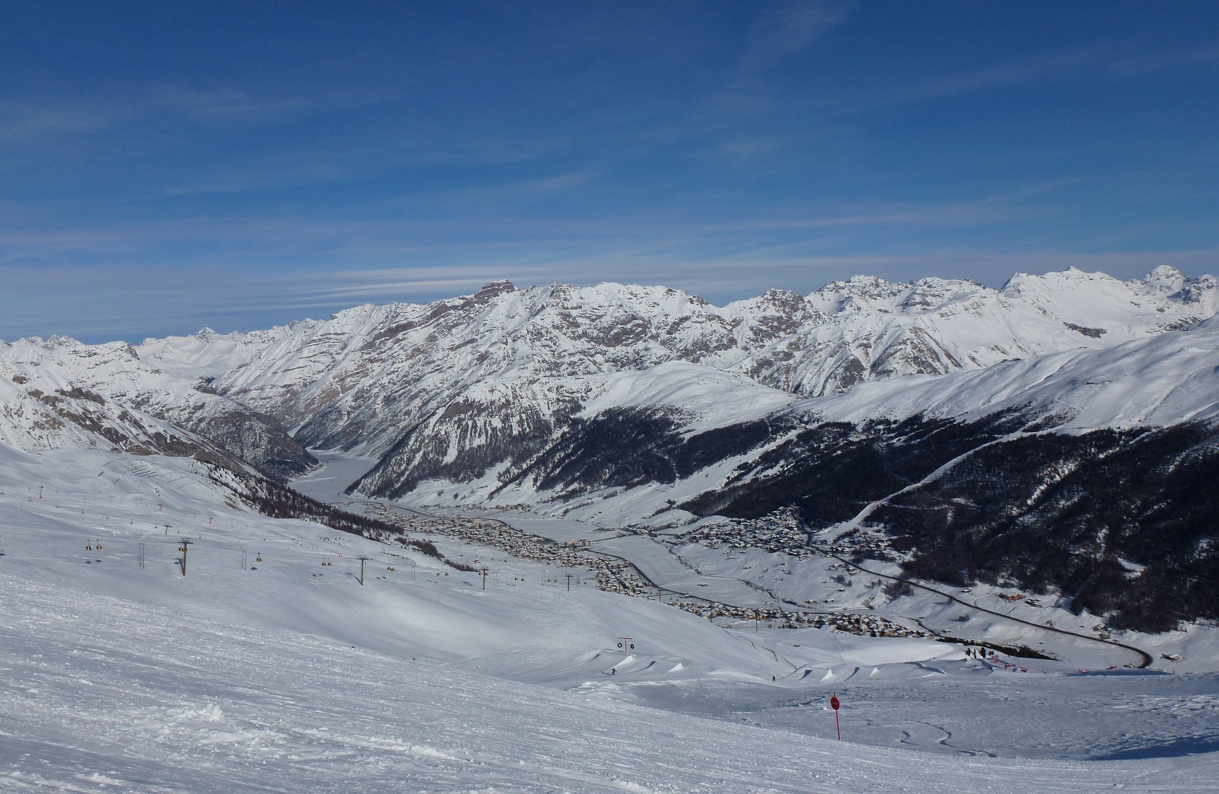 Livigno Winter 2013